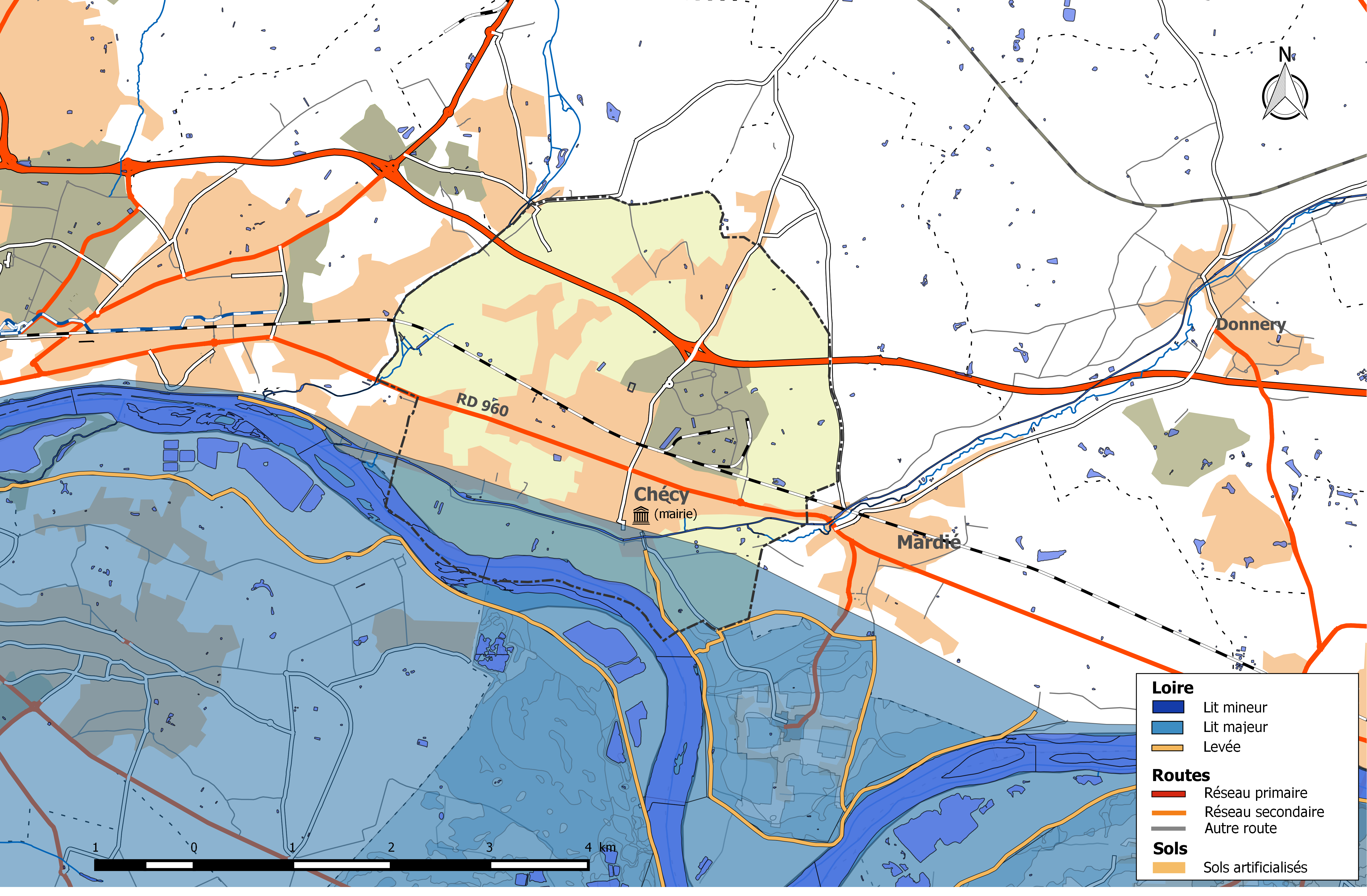 Zone inondable et réseaux hydrographique et routier de la commune de Chécy.